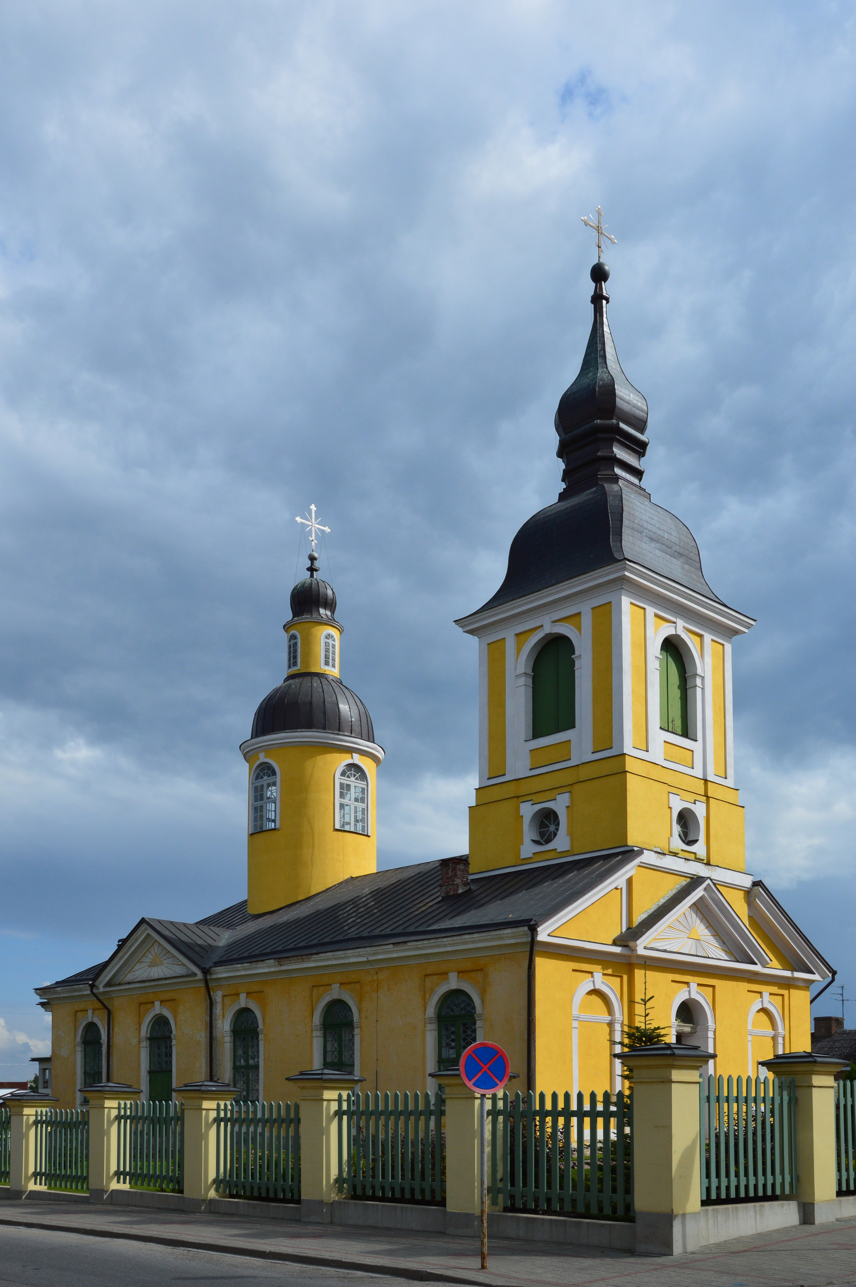 Võru Suurkannataja Ekaterina kirik